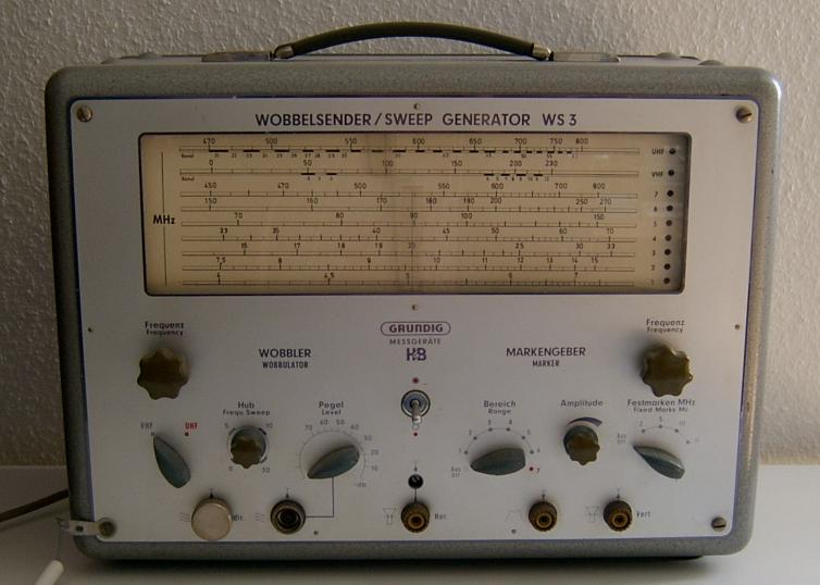 Wobbelsender WS 3 der Firma Grundig AG